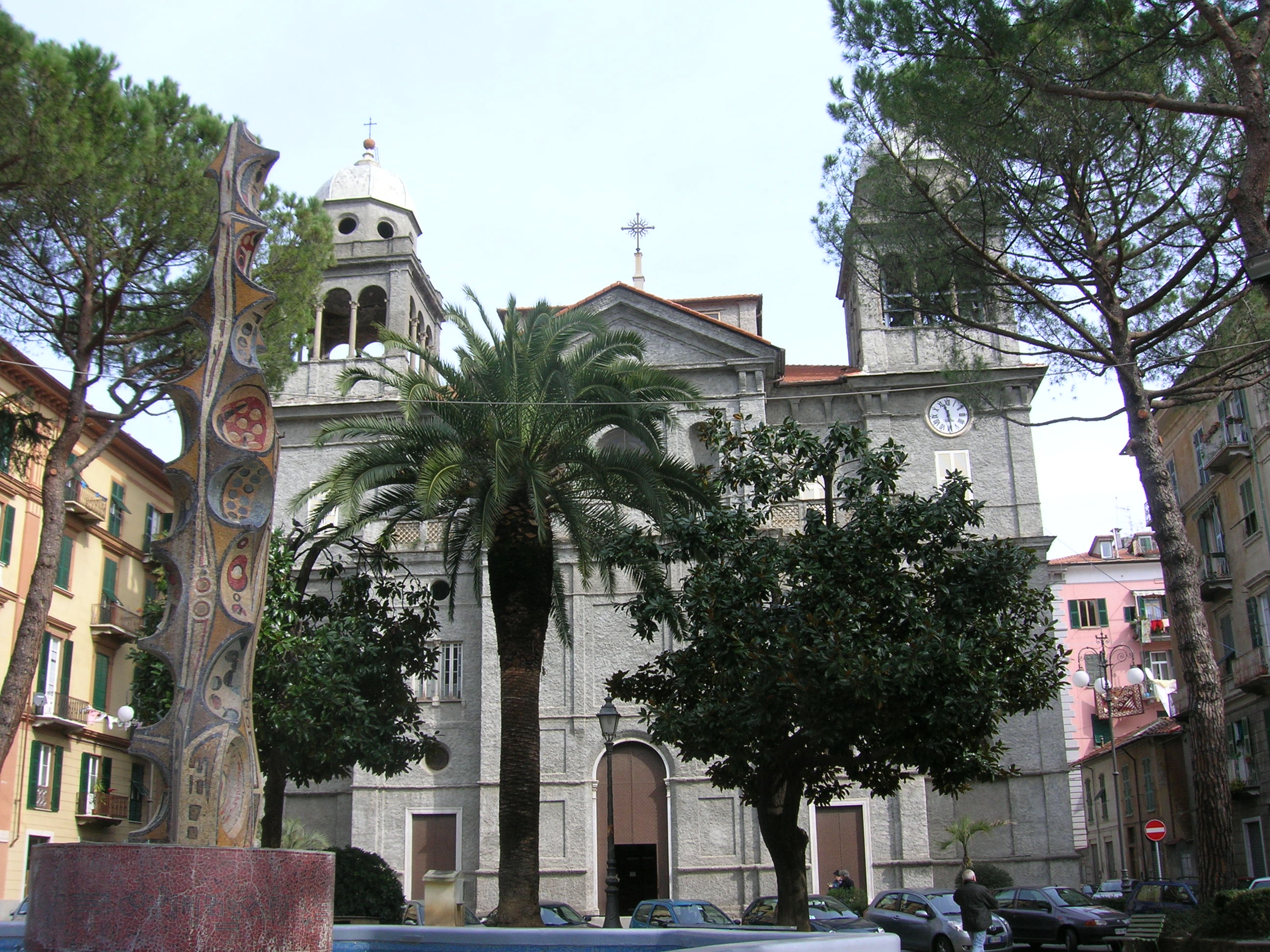 La Spezia - N.S. della Salute e piazza Brin